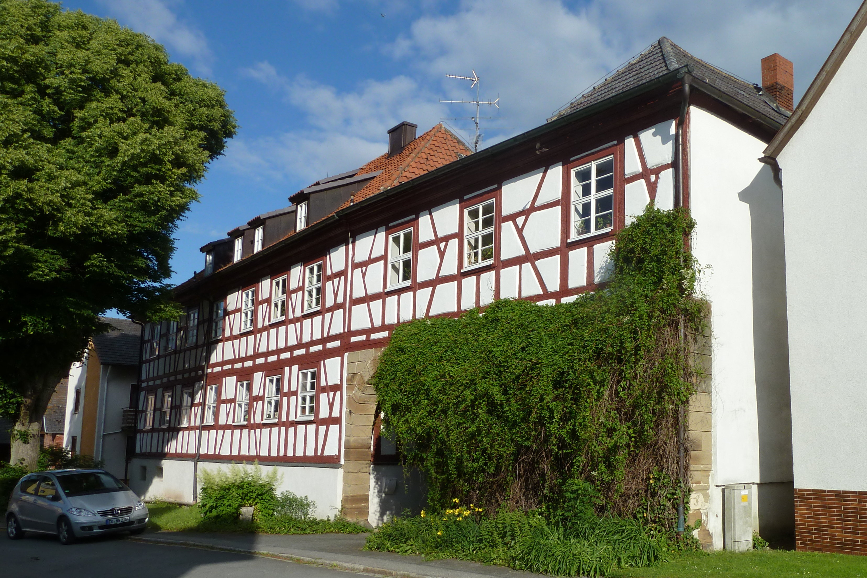 Ehem. Rittergut, Lindenstraße 16, in Wiesenfeld (OT von Meeder) im Landkreis Coburg